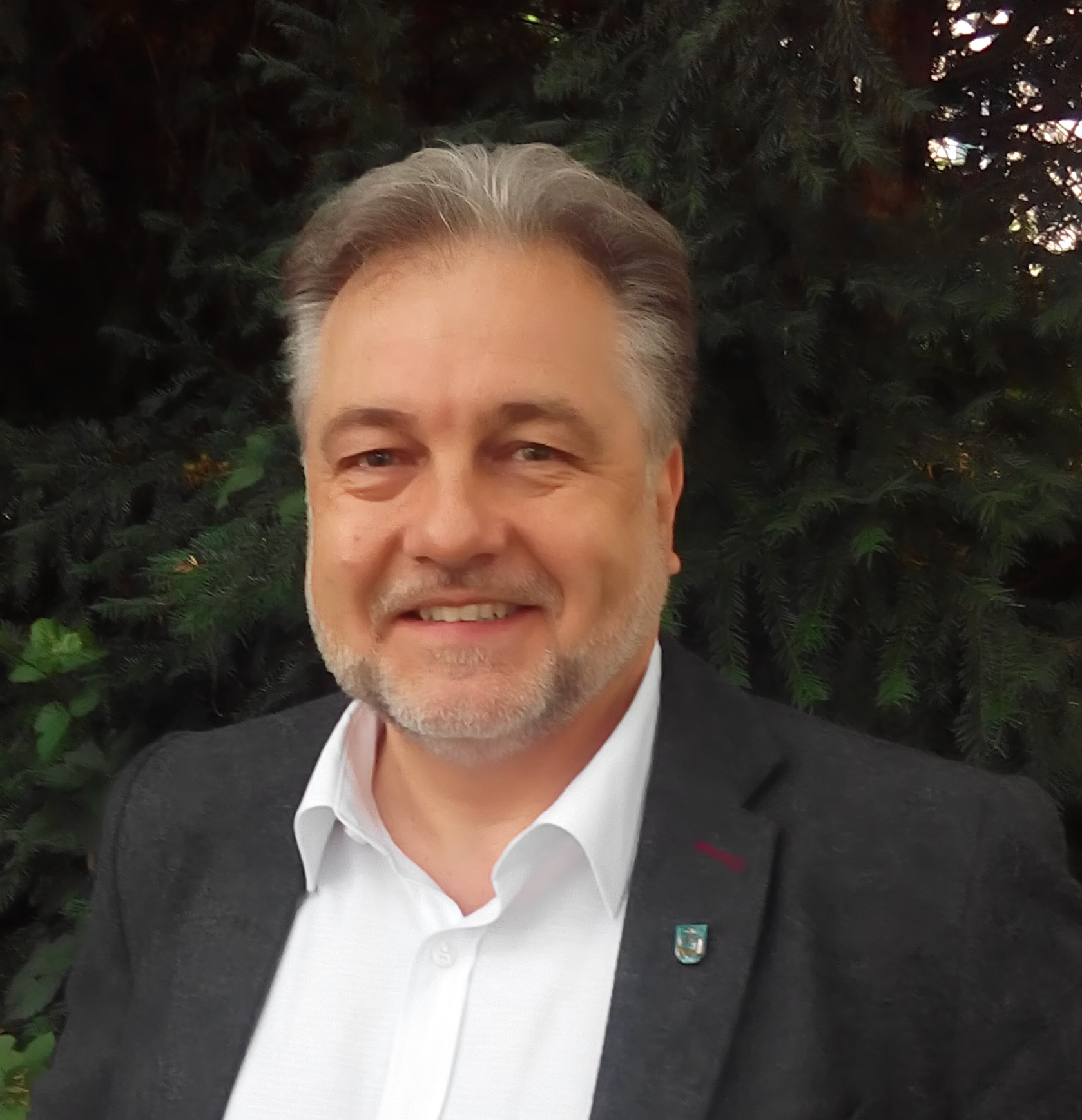 Thomas Dinkelmann (2017)